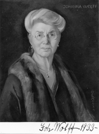 Signiertes Porträt von Johanna Wolff (1858-1943)